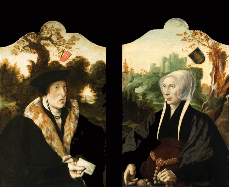 Portretten van de Goudse burgemeester Jan Claesz. Diert [van Haerlem] (1497-1574) en zijn vrouw Emmetje Teunisdr. van Souburgh (†1563)